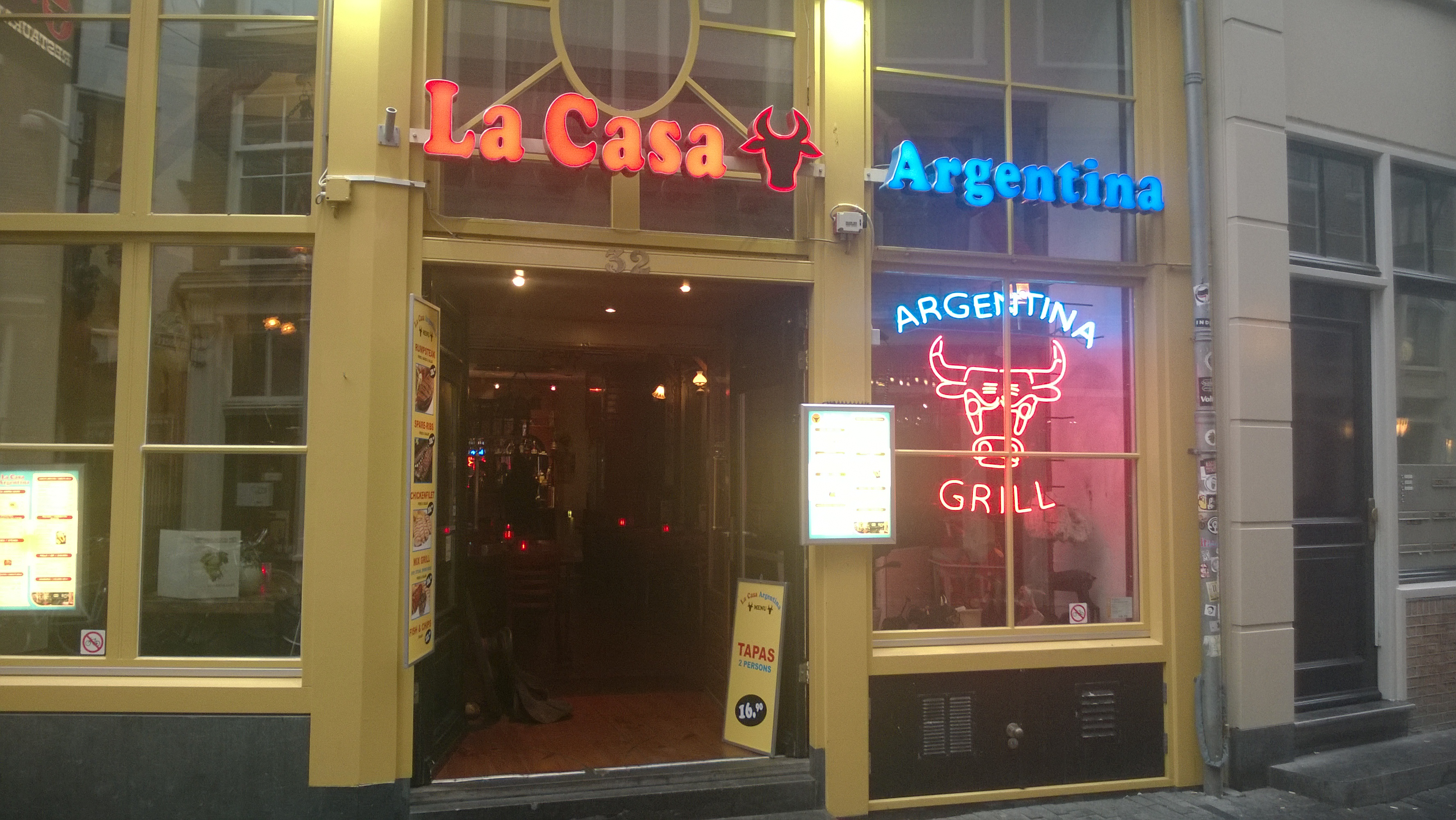 Een Argentijnse steakhouse restaurant in Amsterdam, 2014.